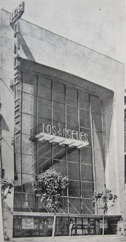 Fachada original del Cine Los Ángeles, en Avenida Corrientes 1764. Buenos Aires, Argentina.